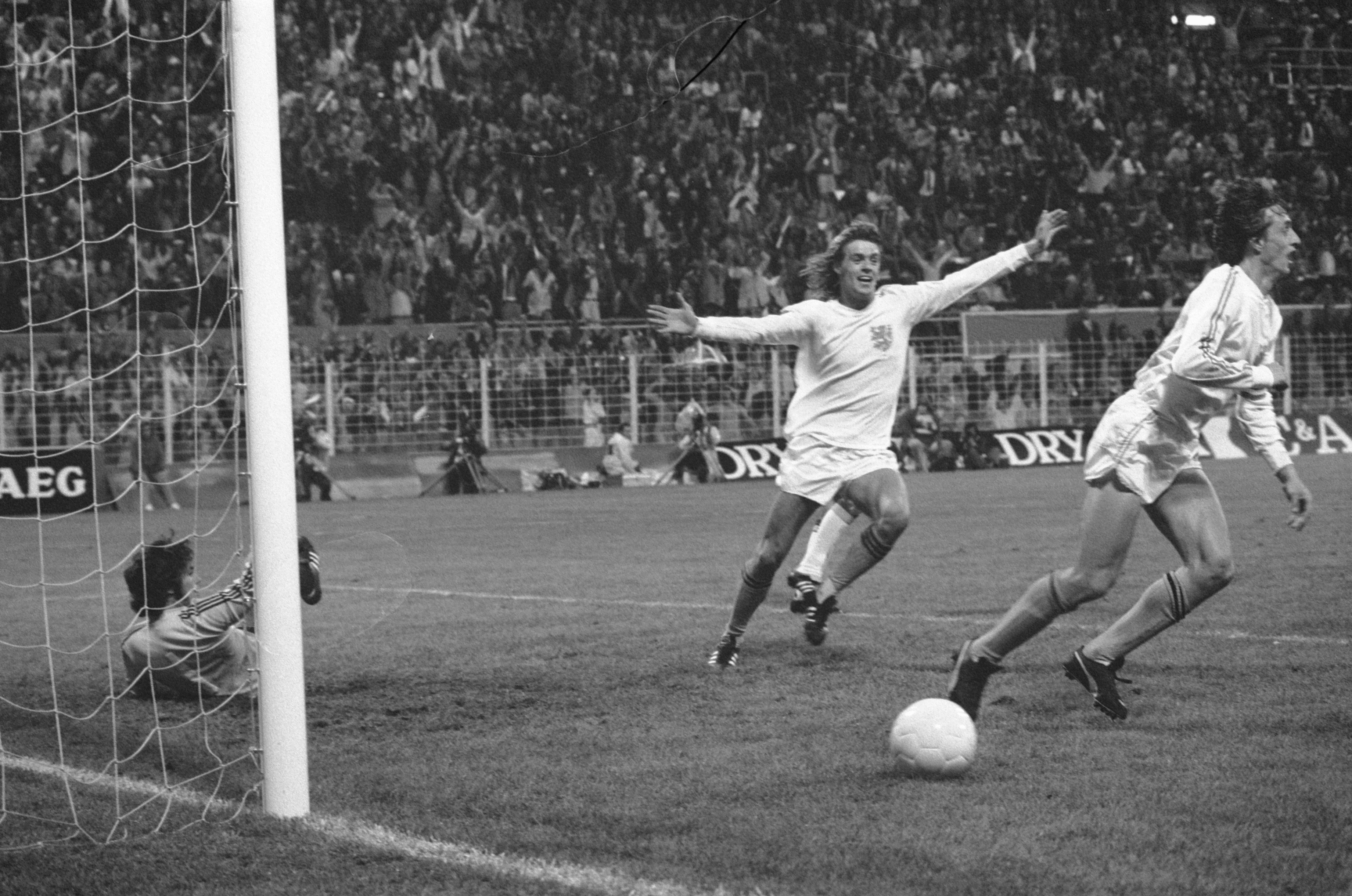 Collectie / Archief : Fotocollectie Anefo Reportage / Serie : [ onbekend ] Beschrijving : WK 74 Nederland tegen Brazilie 2-0, Cruijff heeft gescoord (2-0). Rep juicht, links keeper Leao Datum : 3 juli 1974 Locatie : Dortmund Trefwoorden : sport, voetbal Persoonsnaam : Cruijff, Johan, Cruijff, Johan, Leao, Rep, Johnny Fotograaf : Verhoeff, Bert / Anefo Auteursrechthebbende : Nationaal Archief Materiaalsoort : Negatief (zwart/wit) Nummer archiefinventaris : bekijk toegang 2.24.01.05 Bestanddeelnummer : 927-3018